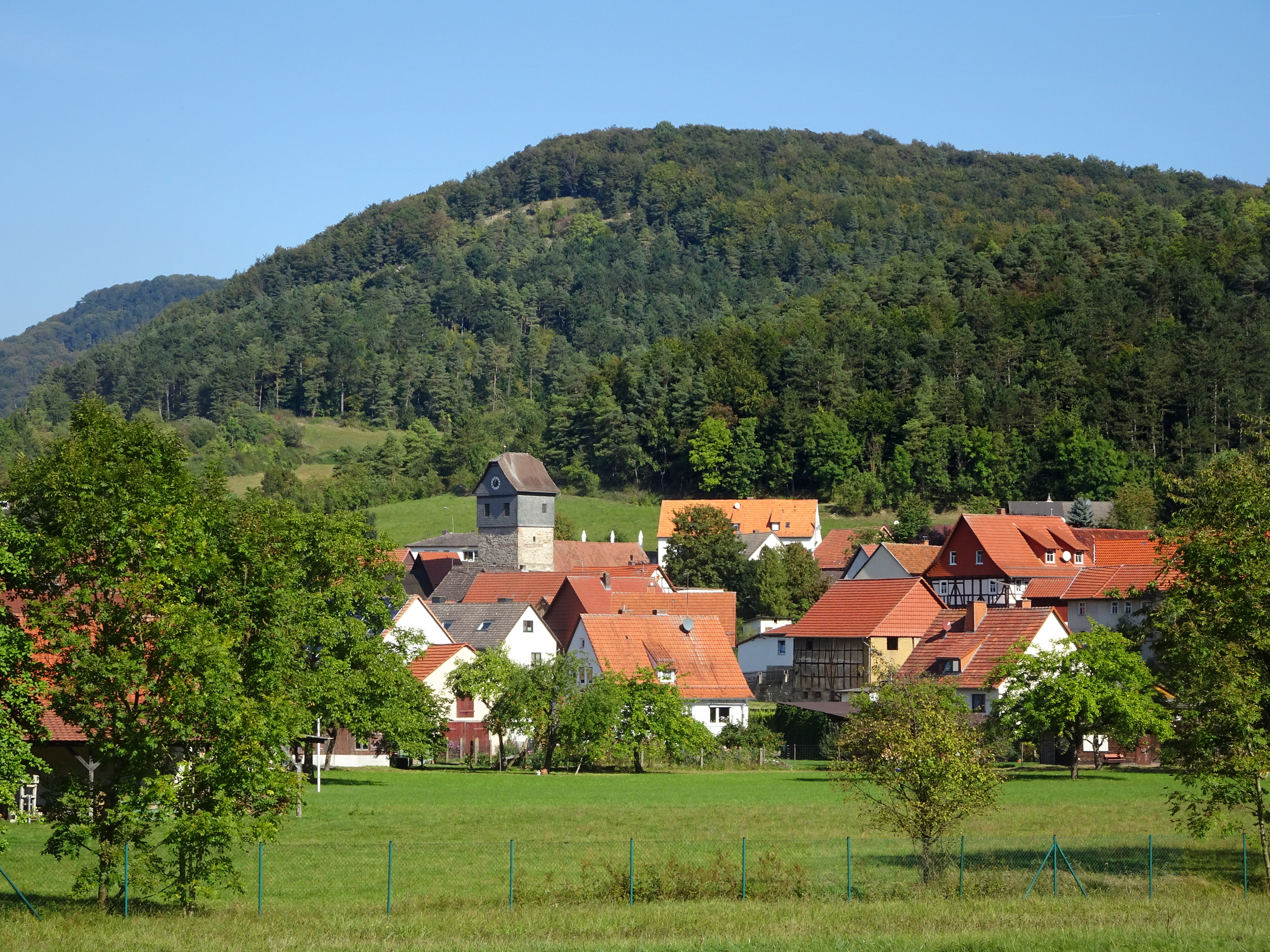 Blick auf Breitau aus südlicher Richtung. Im Hintergrund der Erbberg, der zum Naturschutzgebiet Boyneburg und Schickeberg (WDPA ID 81445) gehört. Breitau ist ein Stadtteil von Sontra im nordhessischen Werra-Meißner-Kreis. Die ursprüngliche Bebauung in der Umgebung der Kirche wird vom Denkmalschutz als Gesamtanlage als schützenswert erachtet. "Die evangelische Pfarrkirche erhebt sich weit sichtbar an exponierter Stelle der nordöstlichen Ortsperipherie. Der Westturm aus massiven Mauerwerk wurde im 13. Jahrhundert errichtet, das ursprünglich dazugehörige Langhaus wurde durch ein Feuer im Jahr 1668 vernichtet. Das heutige Schiff in Backsteinmauerwerk stammt aus dem Jahr 1893." Text aus: Denkmaltopographie Bundesrepublik Deutschland, Kulturdenkmäler in Hessen. Werra-Meißner-Kreis I, Altkreis Eschwege. Peer Zietz, Thomas Wiegand, Braunschweig: Vieweg Verlag, 1991, ISBN 3-528-06240-1.